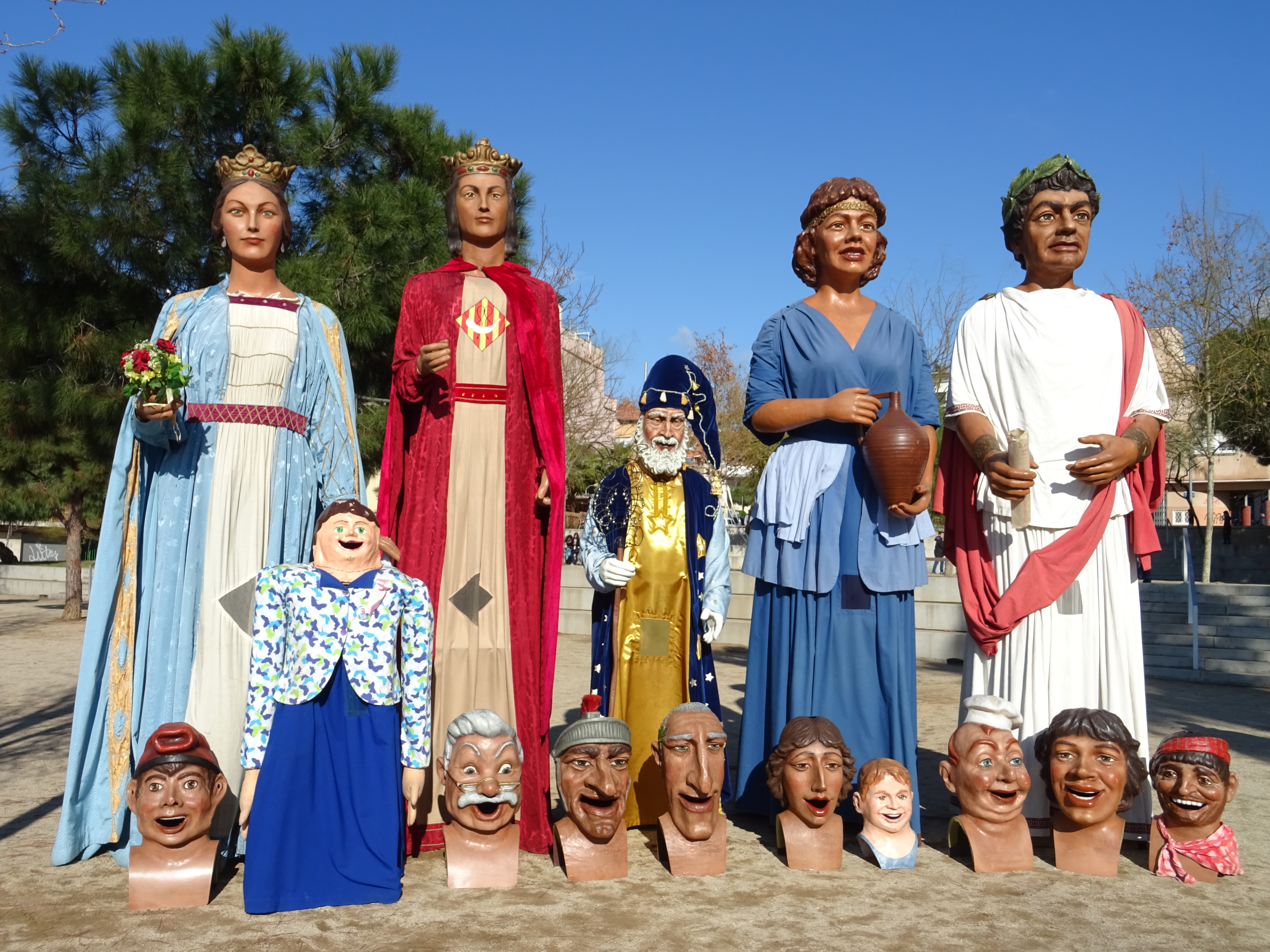 Col·lecció completa dels gegants de Cornellà de Llobregat presa al barri Pedró l'any 2018. D'esquerra a dreta, al fons, els gegants antics Miranda i Corneli, el gegantó del Mag Maginet i els gegants nous Fontsanta i Cornèlius. Al davant, els capgrossos i la gegantona Mariana.